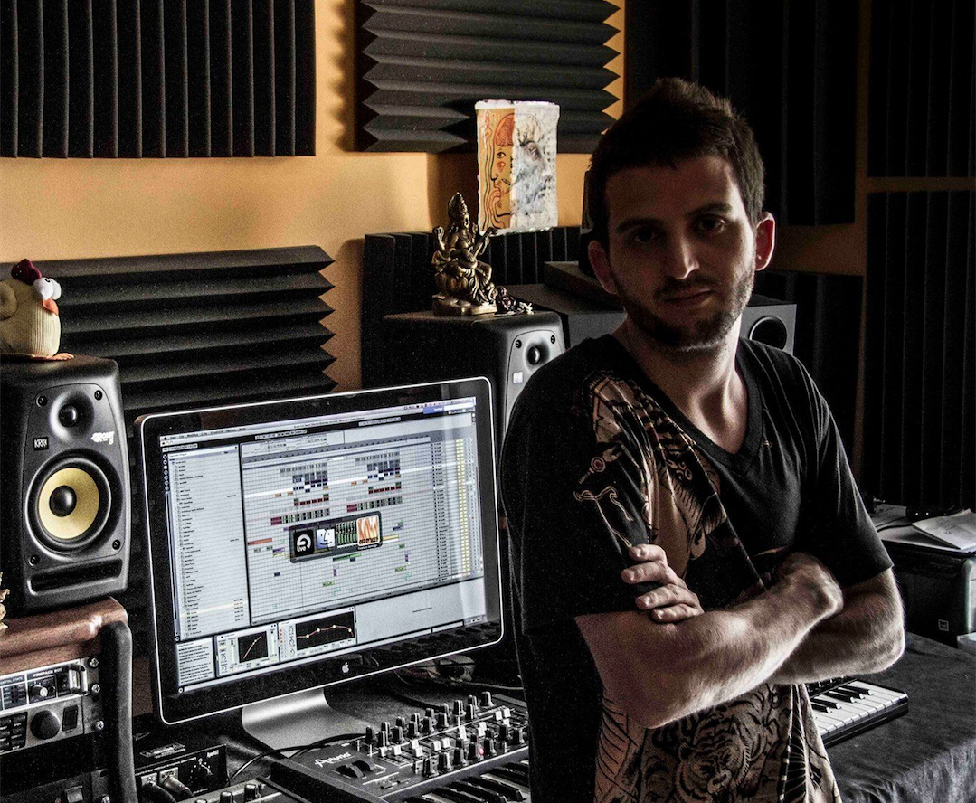 brucegil in studio